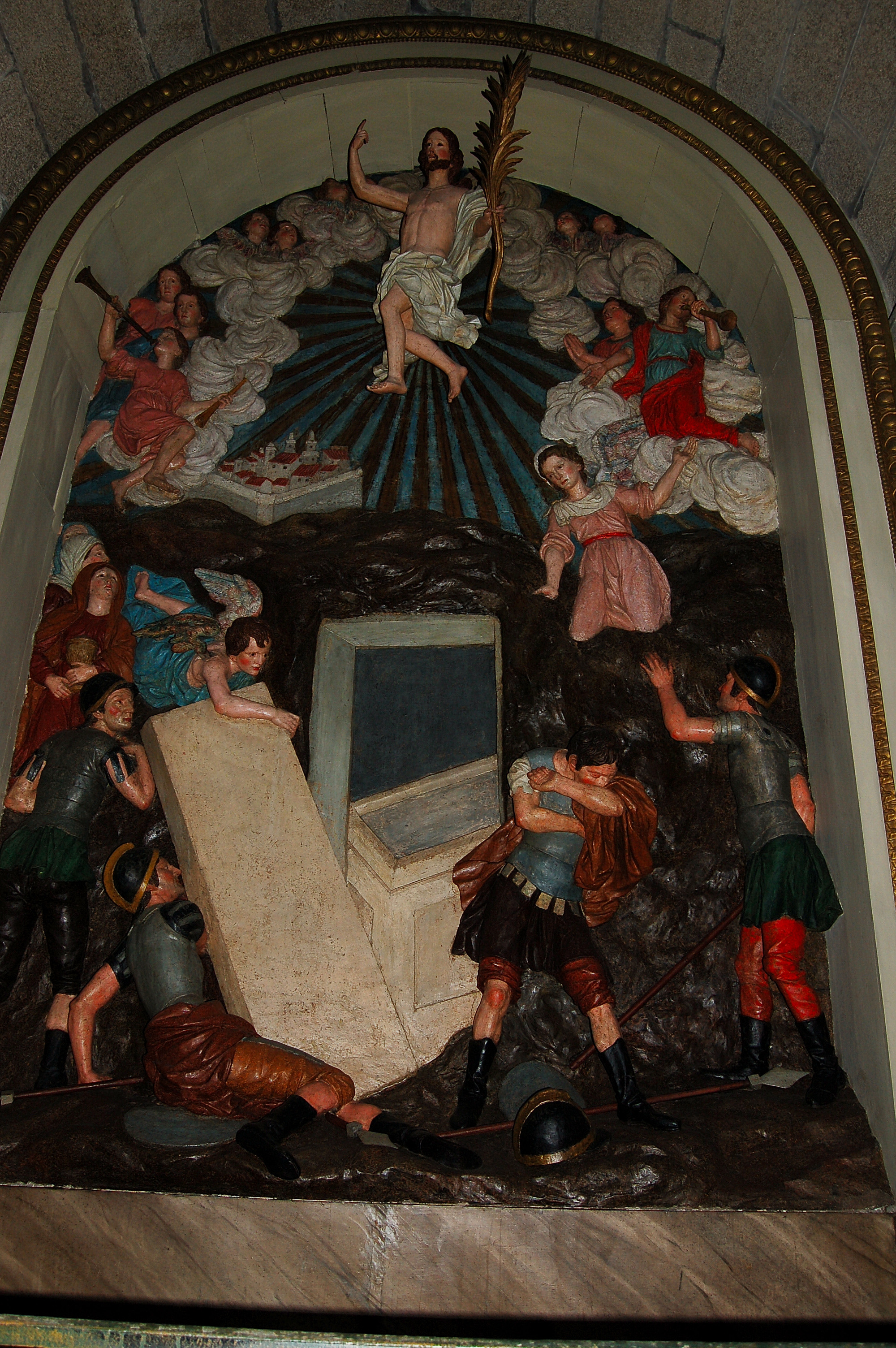 A resurrección de Manuel de Prado Mariño na Capela das Ánimas de Santiago de Compostela